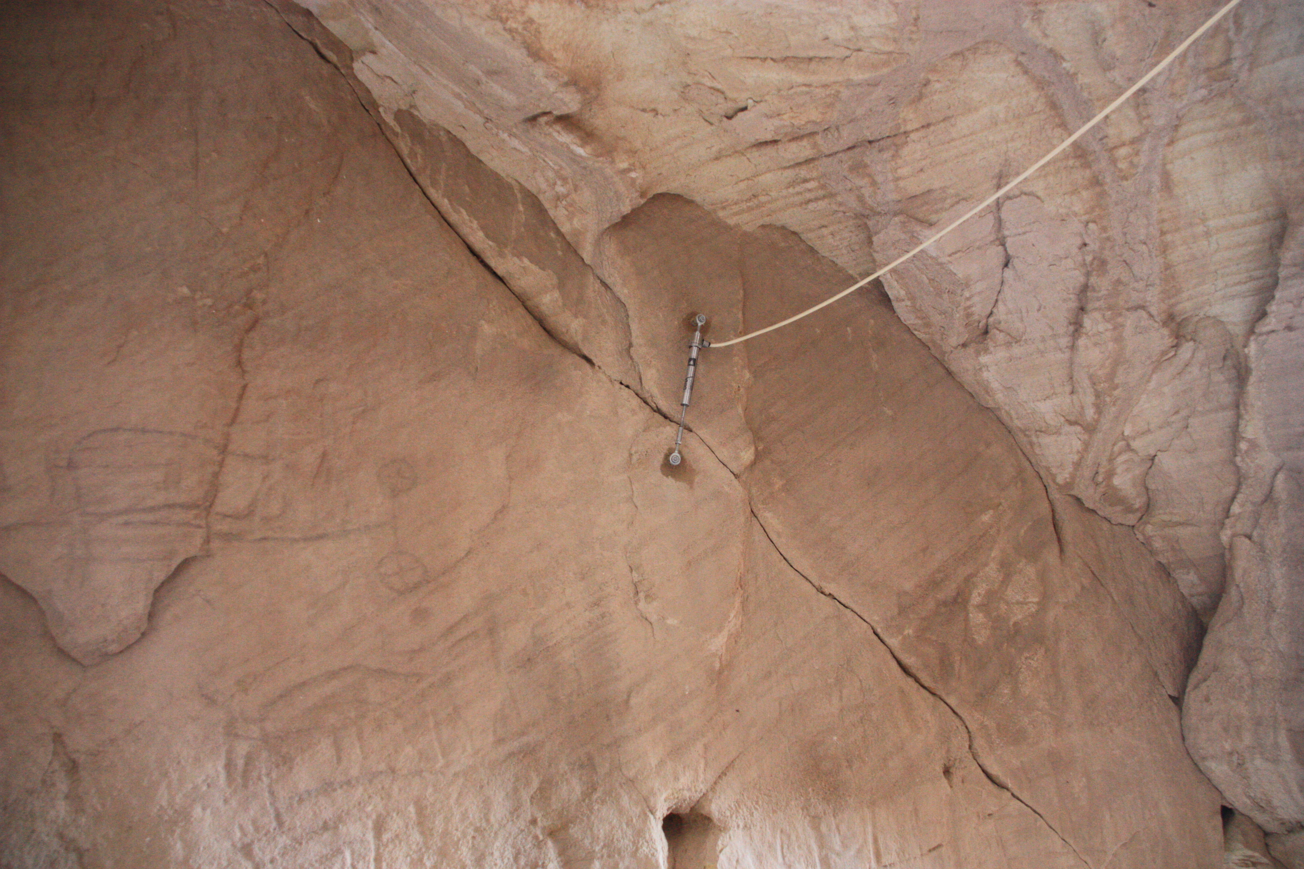 Датчик движения стен